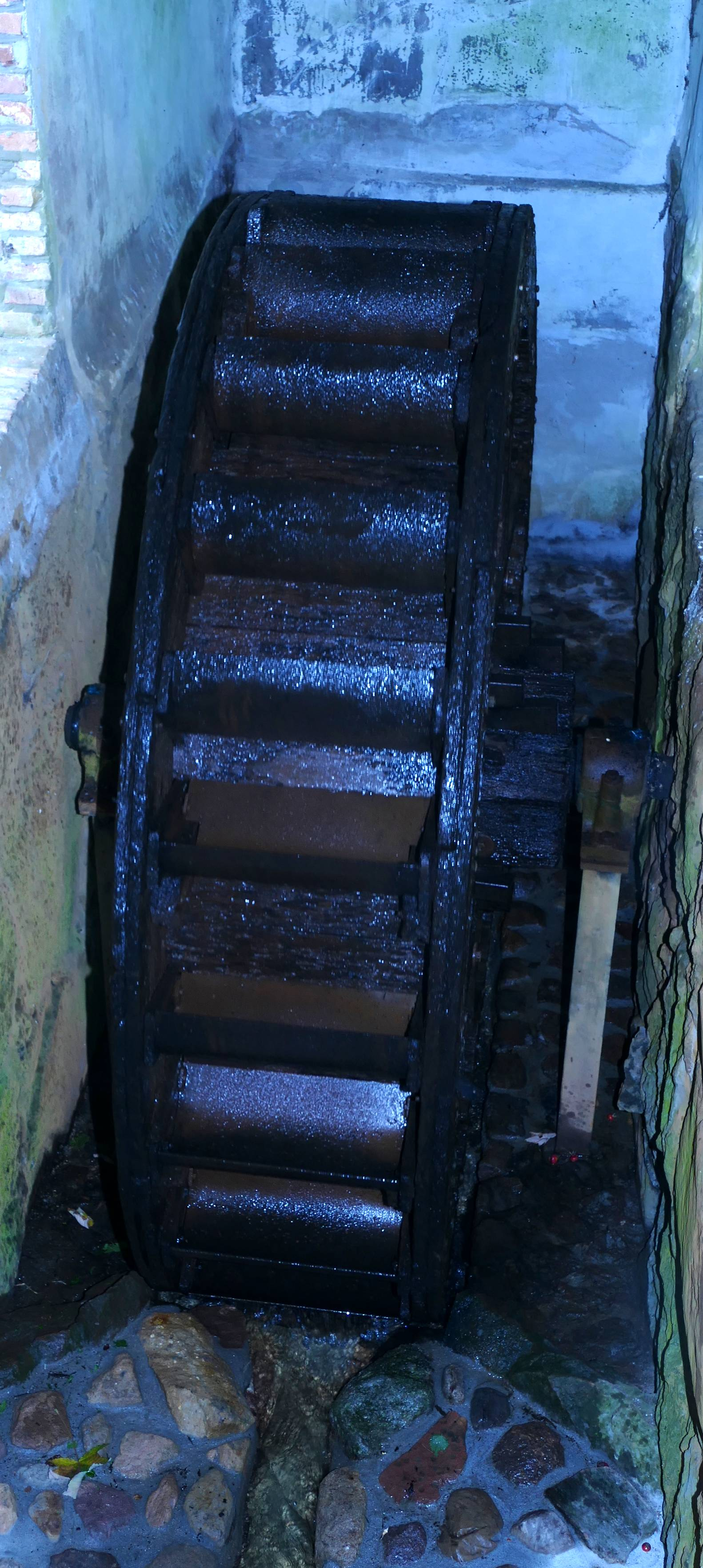 Das Wasserrad der Deelbrügger Mühle hat wieder Wasser.